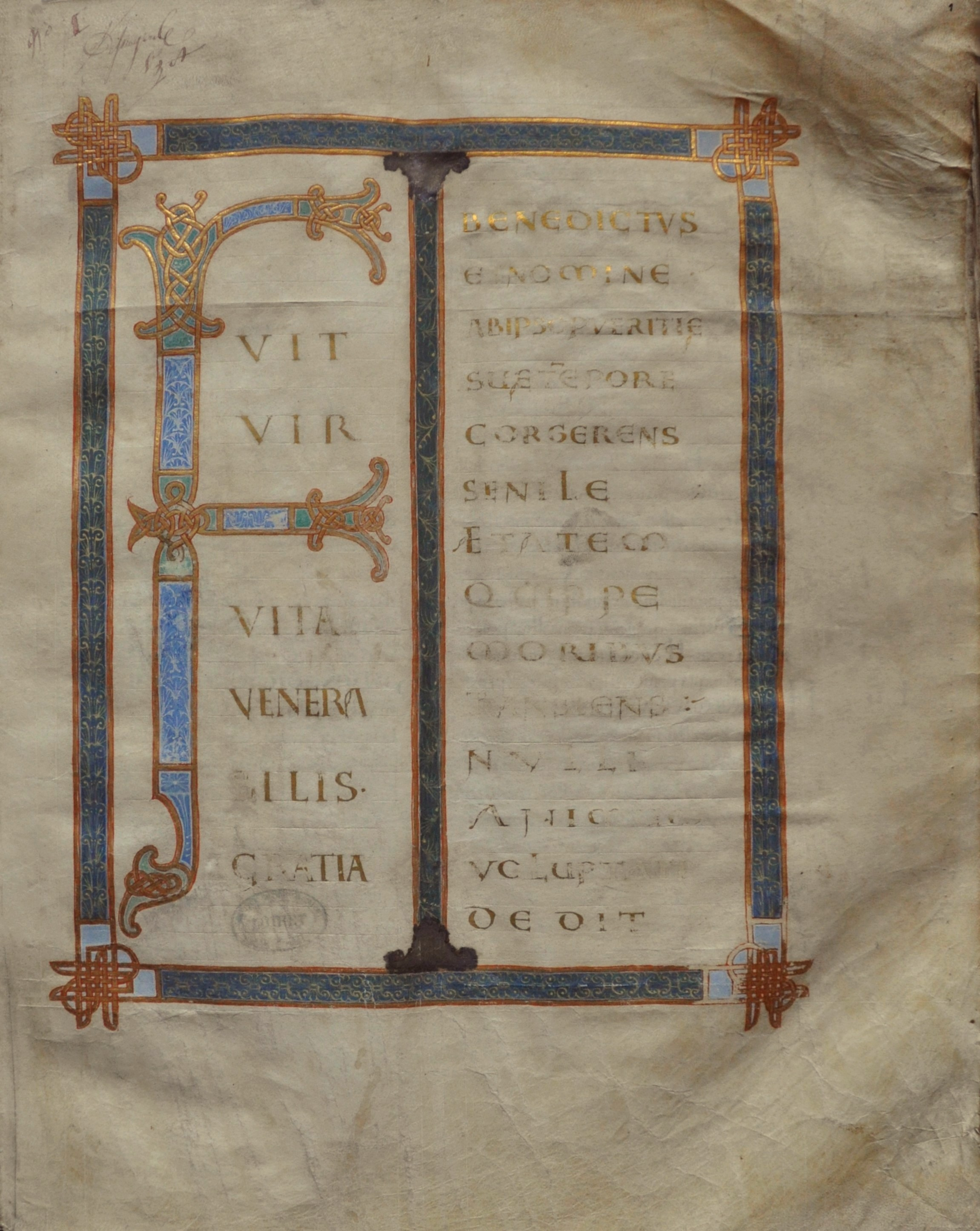 Première page d'un manuscrit des Miracula Santi Benediti conservé aux Archives départementales du Loiret; Grégoire I, Dialogues (Dialogorum libri quattuor de vita et miraculis patrum italicorum), livre 2. Fvit vir vita venerabilis gratia benedictus et nomine ab ipso pveritie sue tẽpore cor gerens senile Etatem moribus transiens: nulli animum voluptati dedit.